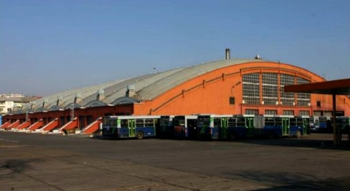 Hamzsabégi úti autóbusz garázs és műhely, Budapest (1941-ben épült)